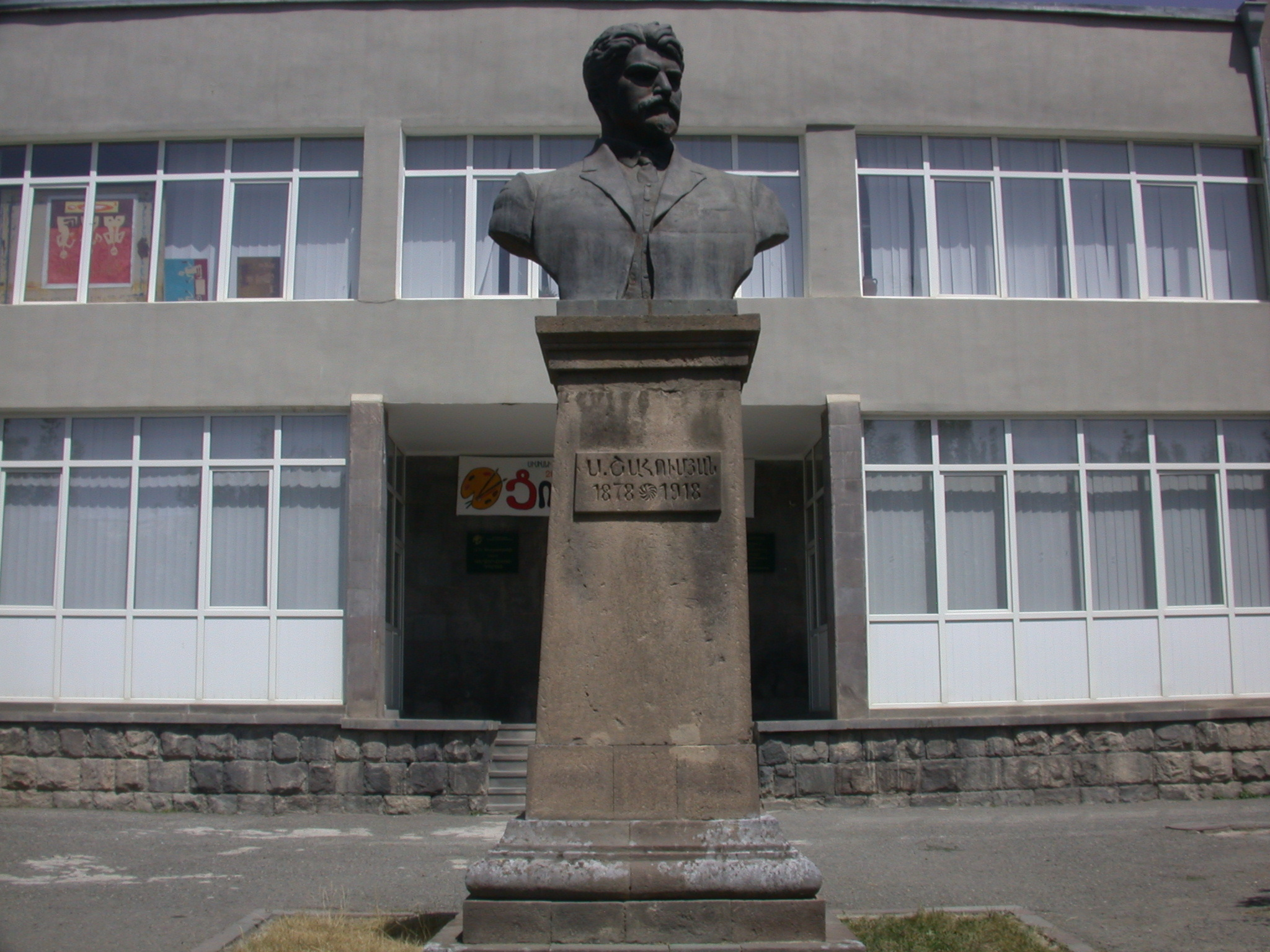 Ստեփան Շահումյանի հուշարձանը Սիսիանում 6/26